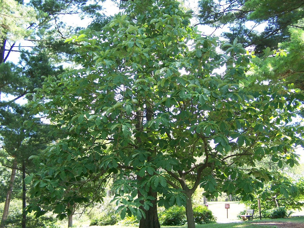 Whitebark Magnolia, Magnolia hypoleuca, Morton Arboretum specimen 1286-58-1